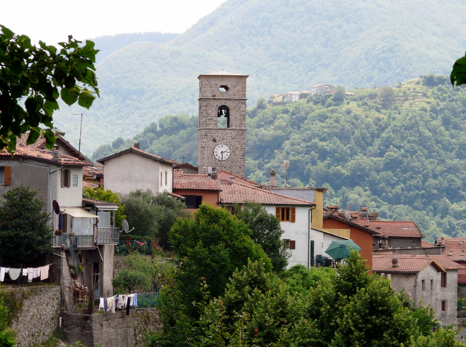 Vergemoli, Toscana, Italia